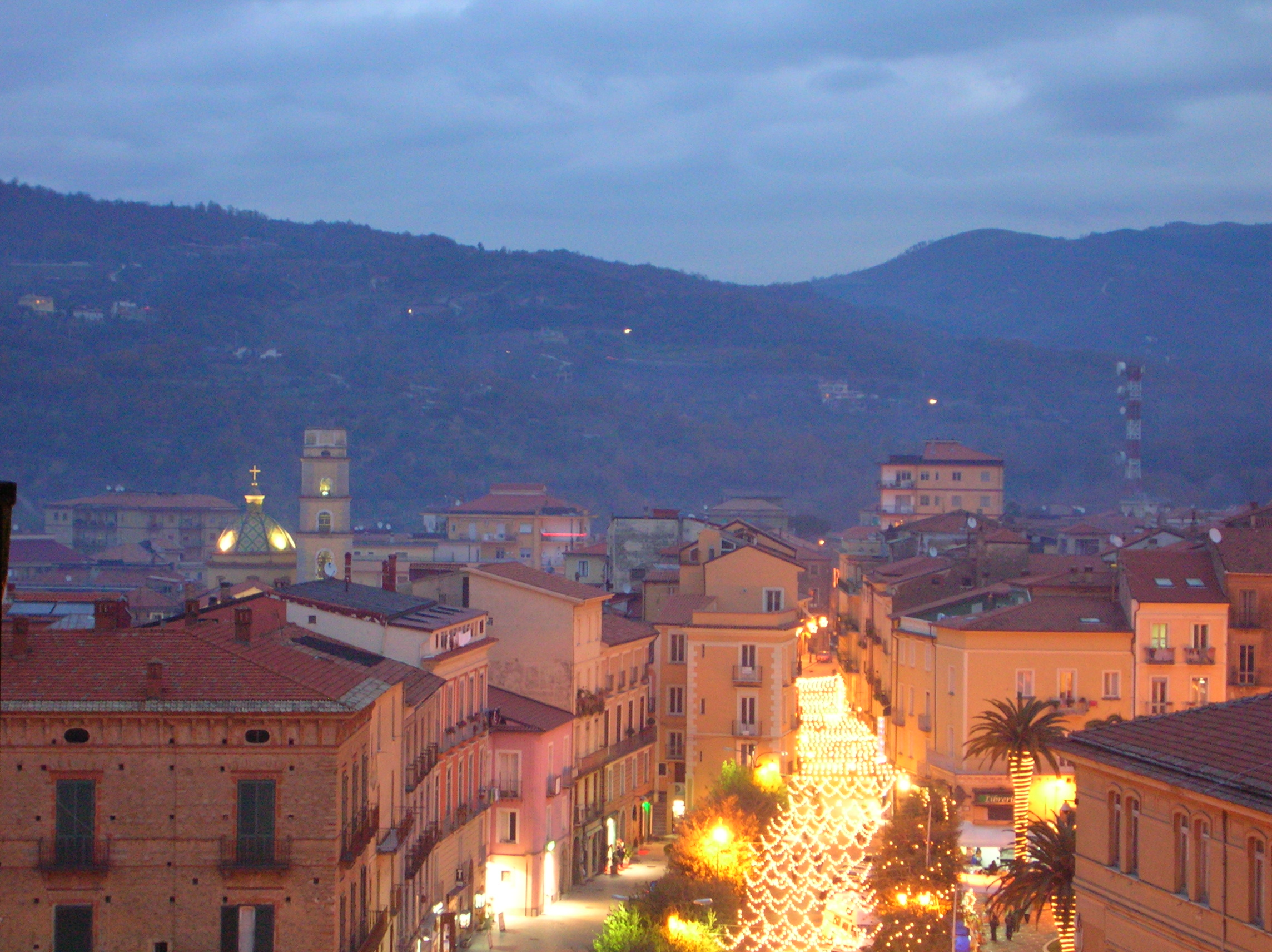 Scorcio Vallo della Lucania (SA)